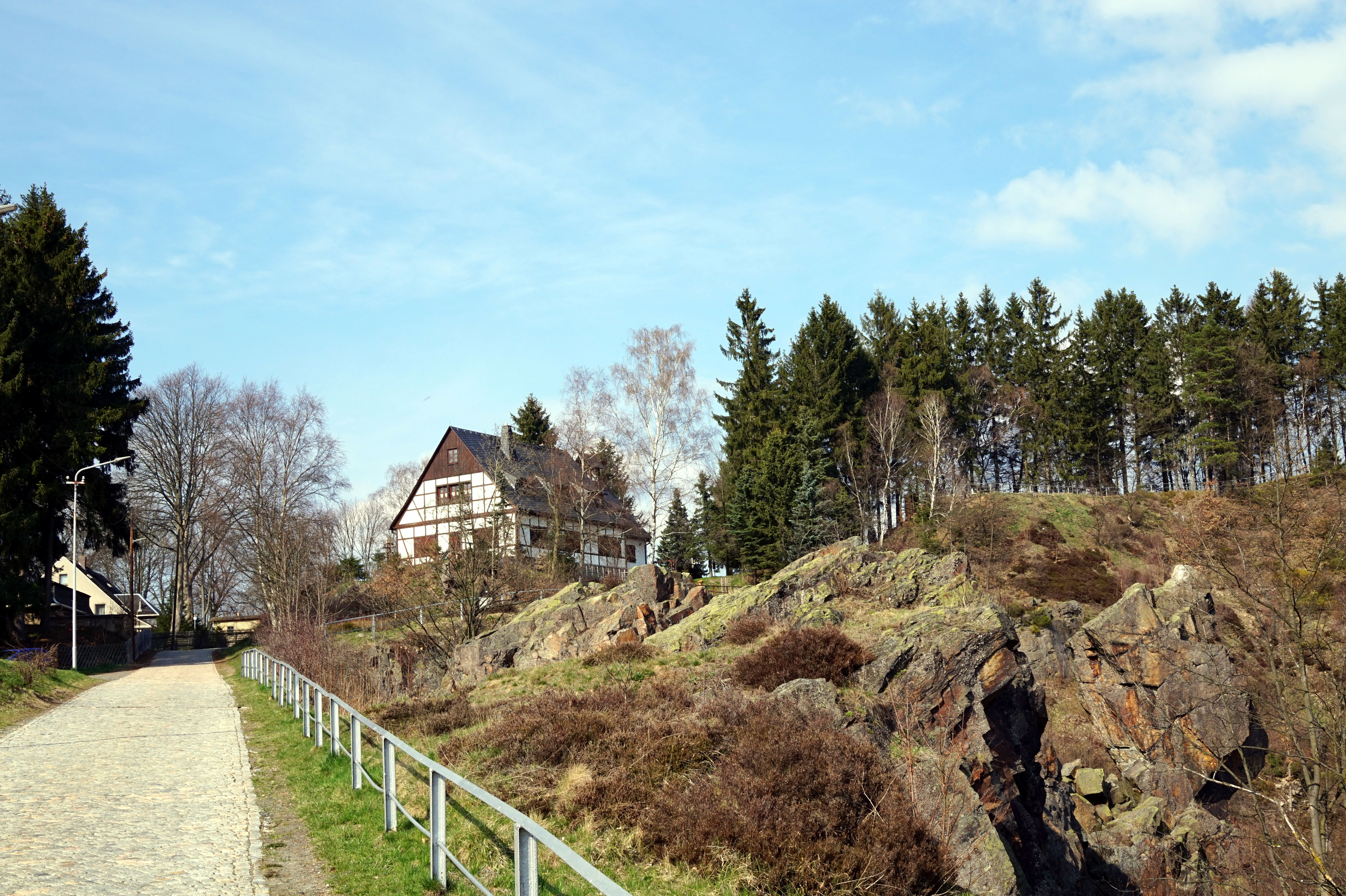 Das Huthaus wurde 1994 erbaut.